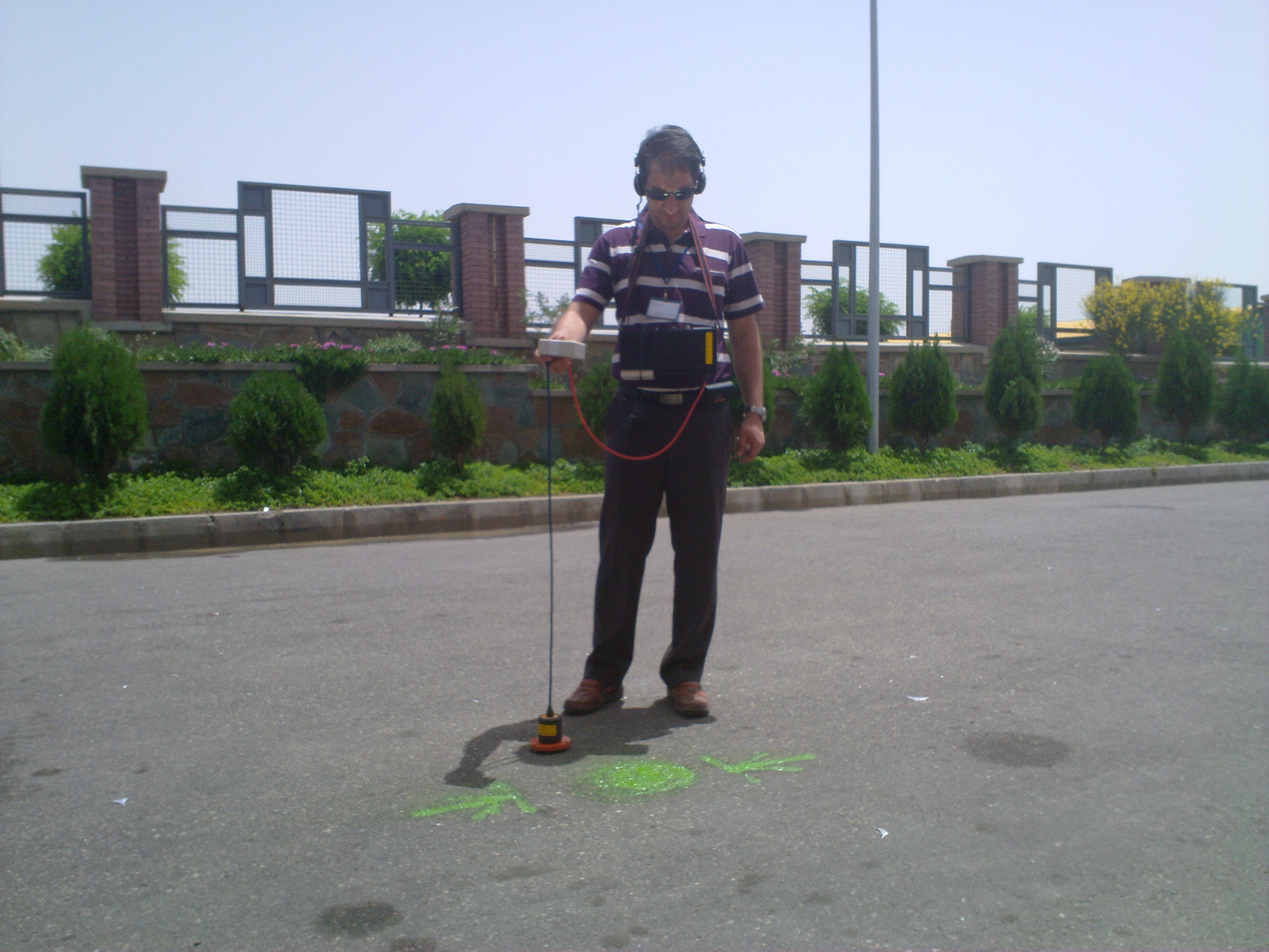 نشت یابی آکوستیک با استفاده از ژئوفون زمینی در شهرک صنعتی کاوه